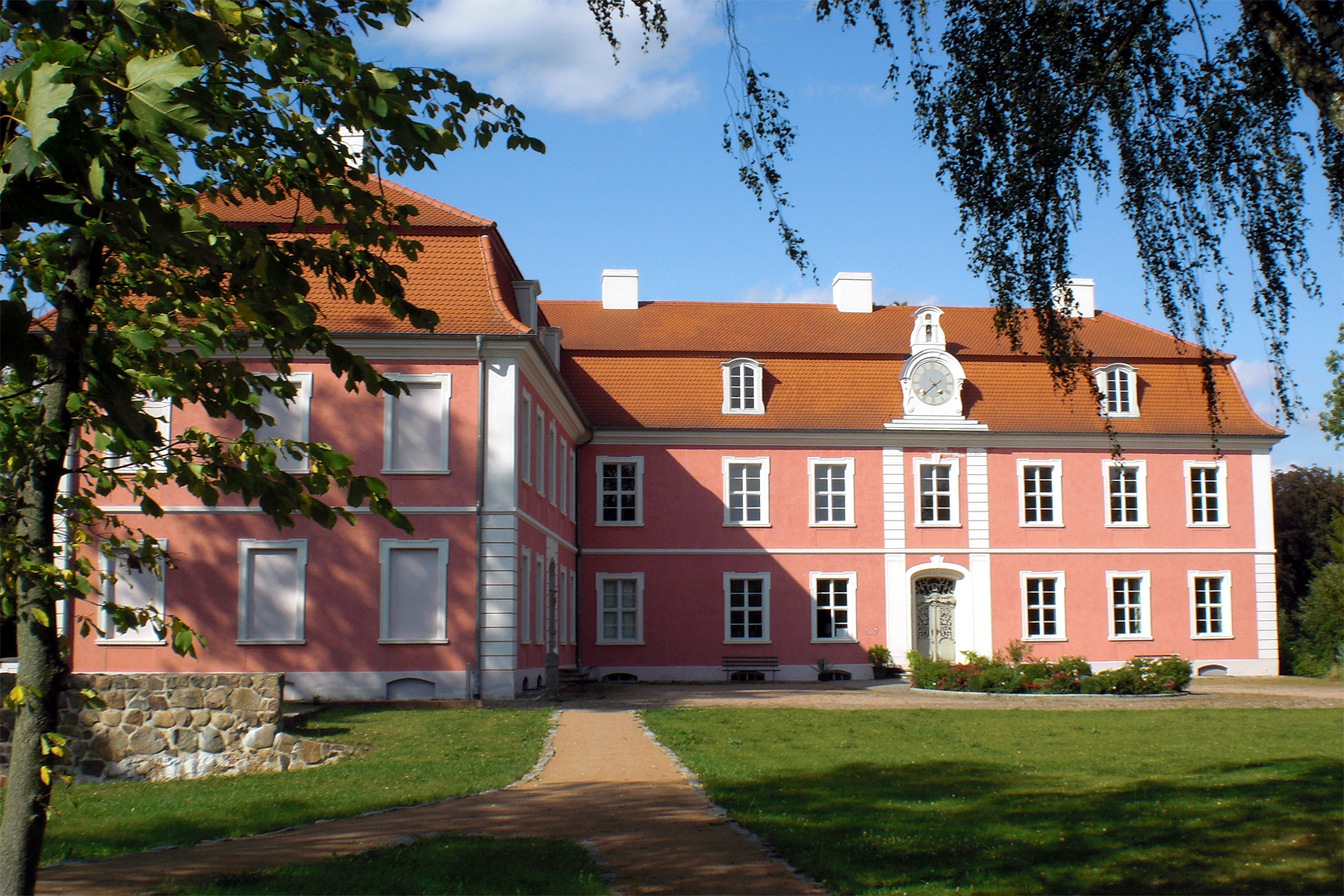 Schloss Wolfshagen in Groß Pankow, Landkreis Prignitz